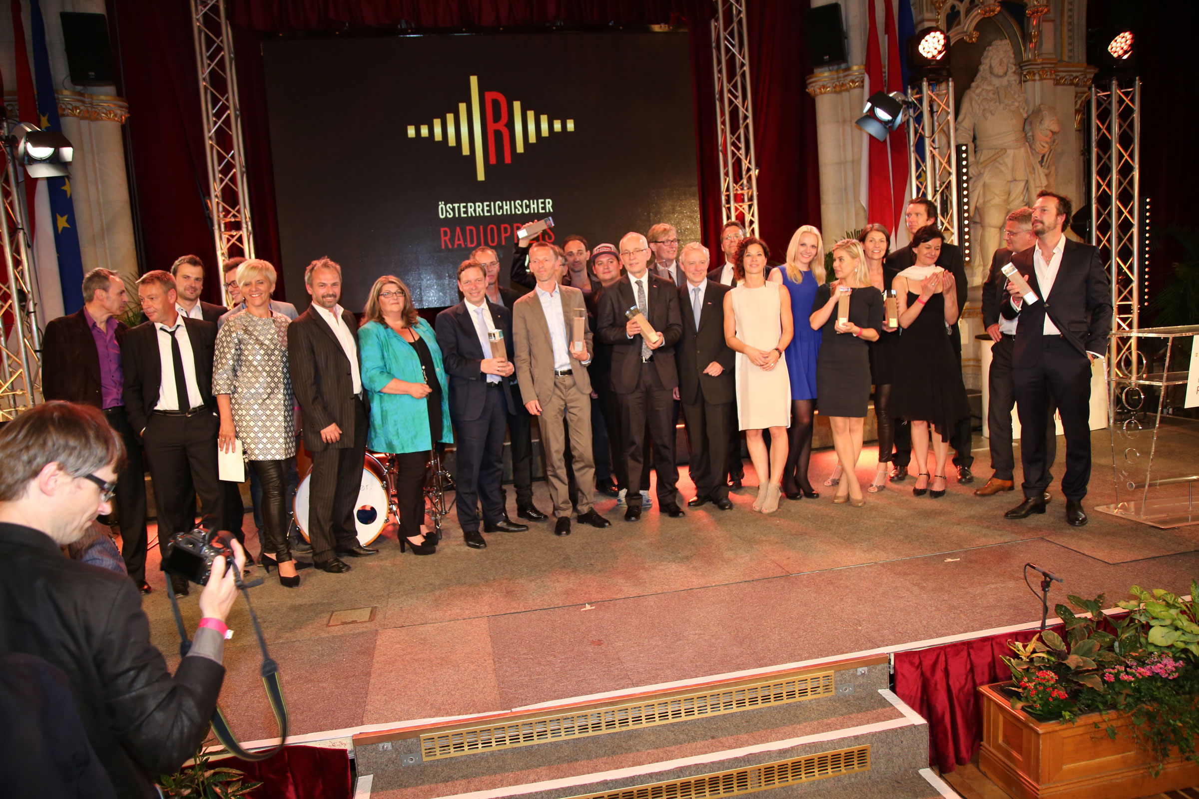 1. Österreichischer Radiopreis 2015 - alle Preisträger